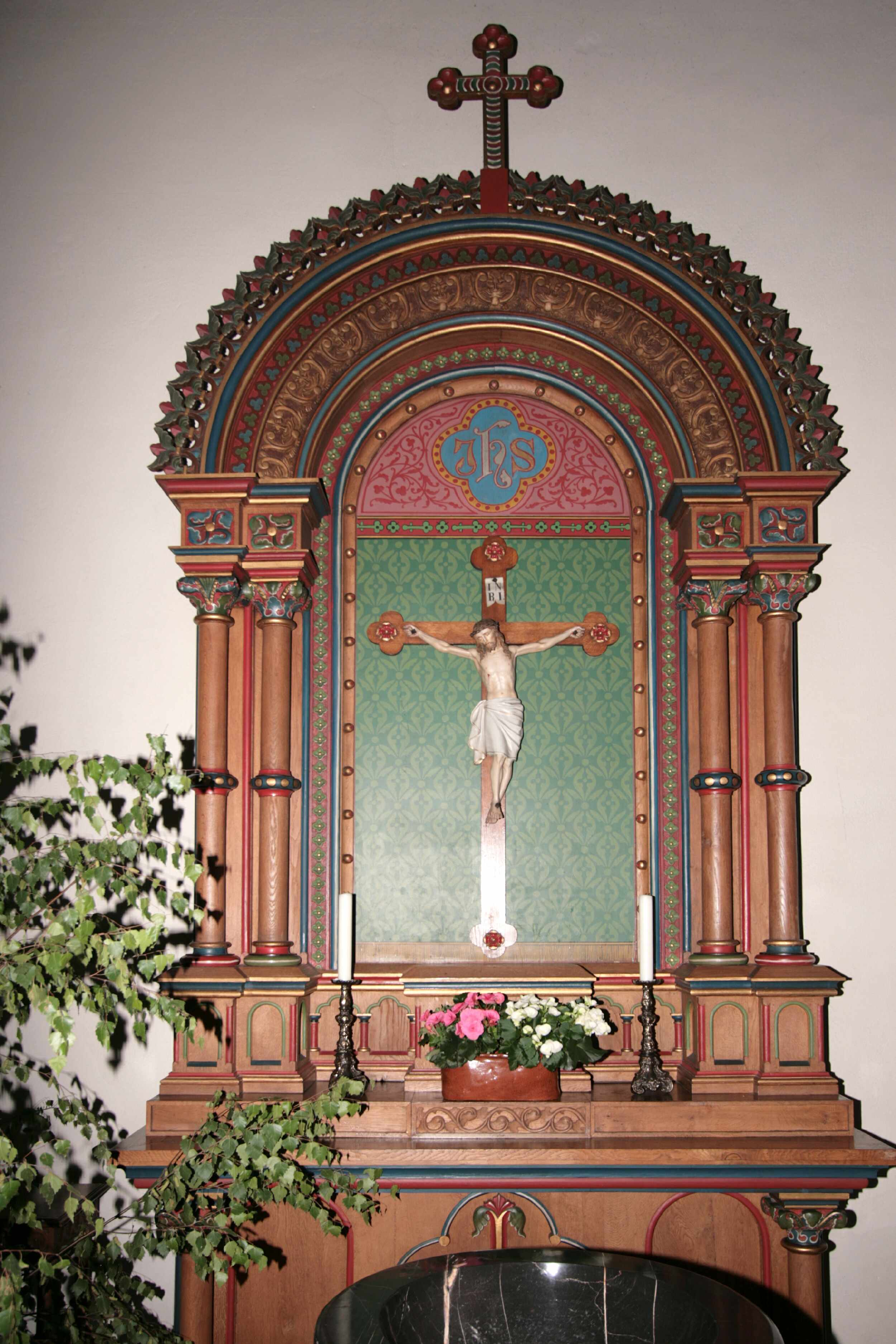 Beschreibung: Seitenaltar Kirche St. Martin in Bigge Quelle: Eigenes Foto Urheber: Wolfgang Poguntke Aufnahmedatum : 13.07.2008